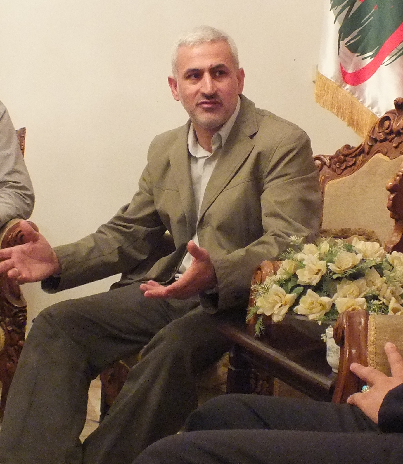 حسن شاطری-فرماندهان سپاه قدس و مسئول بازسازی لبنان